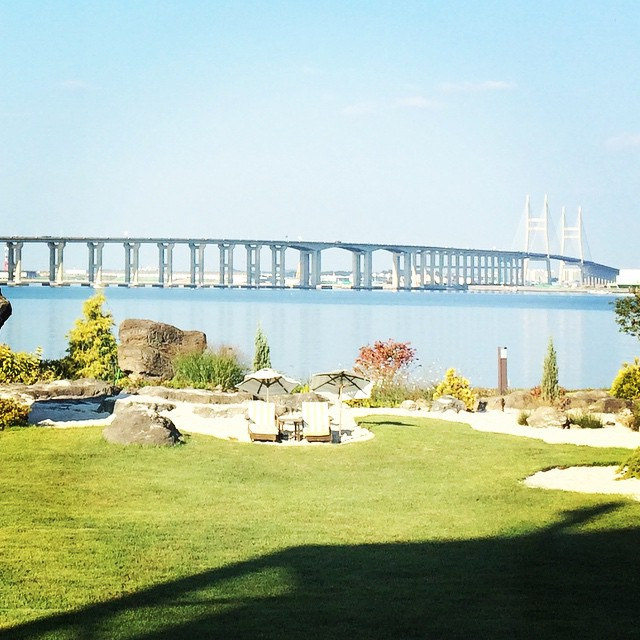 해어름카페. 뒤로는 서해대교. -korea Seohae Grand Bridge